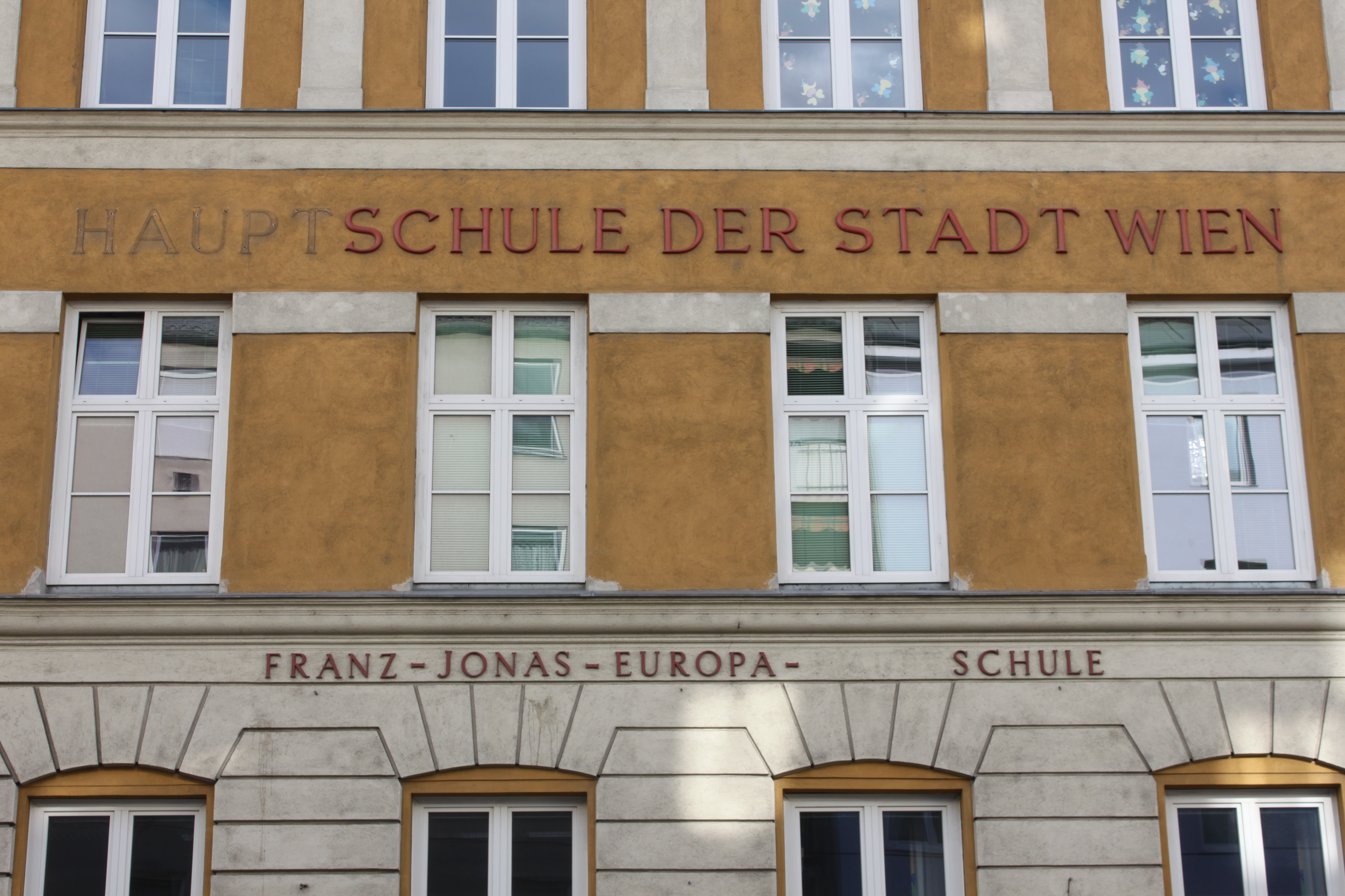 Franz-Jonas-Europa-Hauptschule in Wien-Floridsdorf, Entfernung von Hauptschule in der Nennung, Umstellung auf die mit Schuljahr 2015/2016 geänderte Bezeichnung Neue Mittelschule